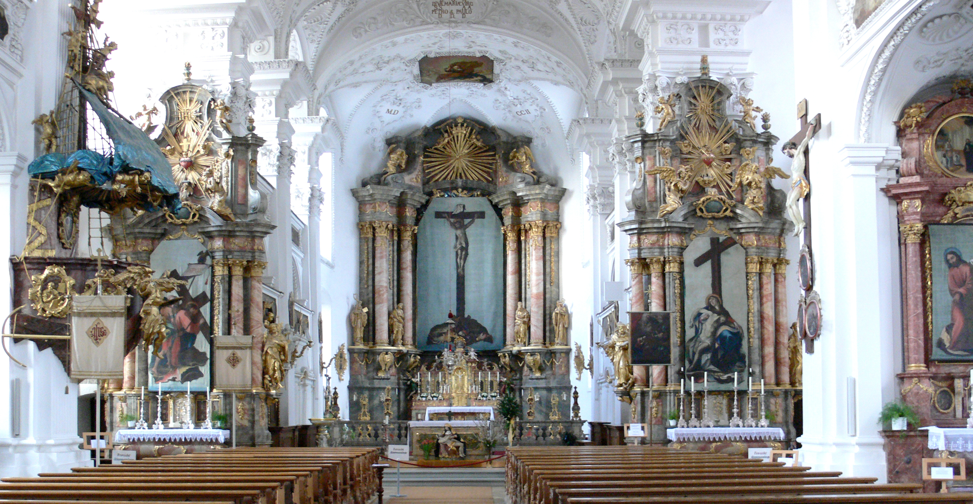 Ehemalige Klosterkirche Irsee, Irsee, Landkreis Ostallgäu Altäre, abgedeckt mit Fastentüchern des 18. Jahrhunderts